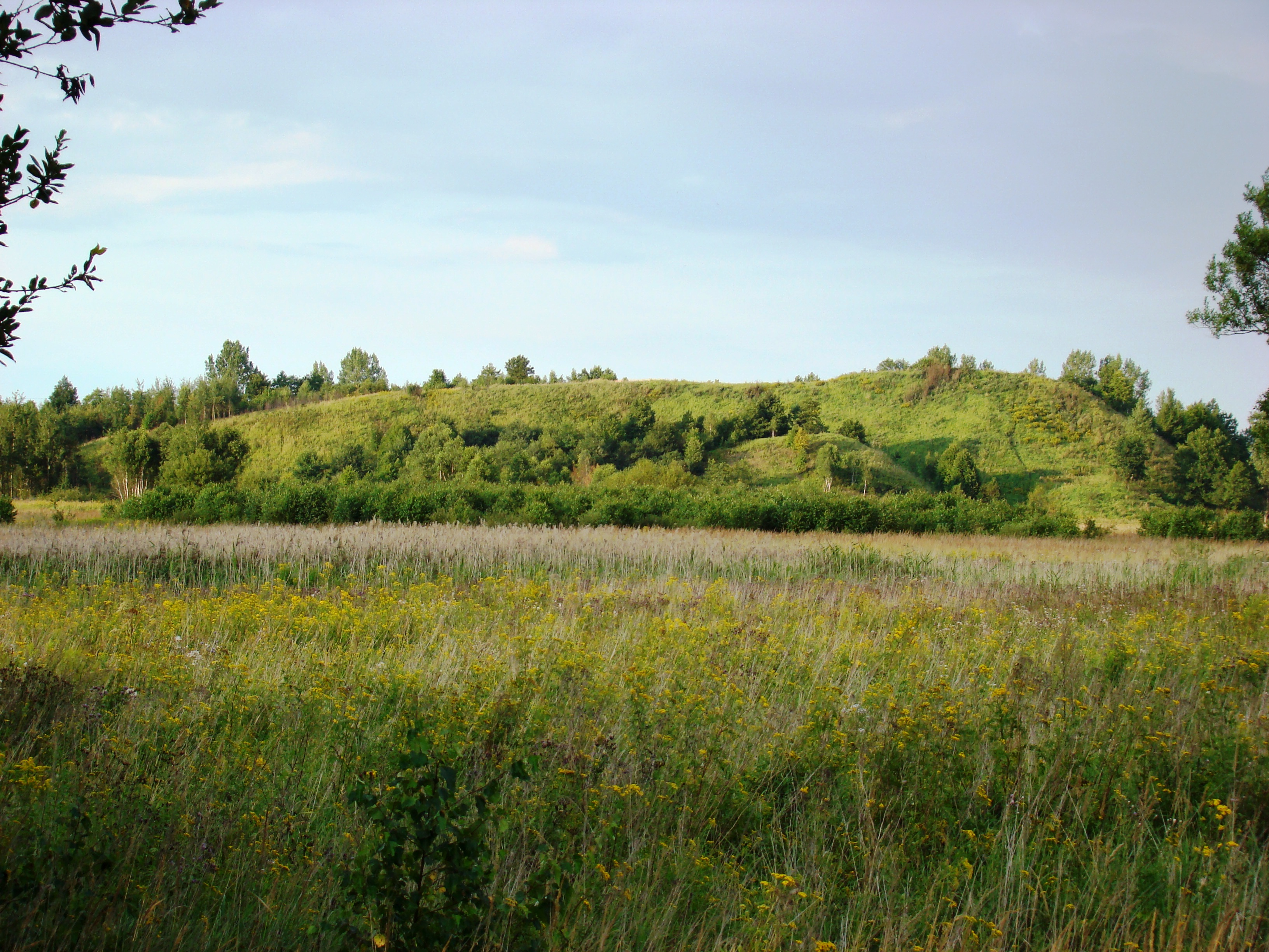 Hałda kopalni rud żelaza "Franciszek" w Gnaszynie Górnym